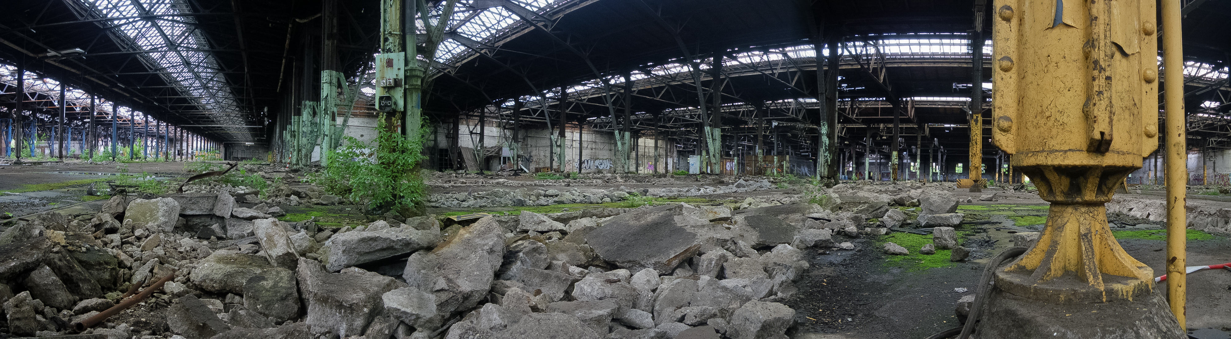 Wagenreparaturwerkstatt der RAW Magdeburg